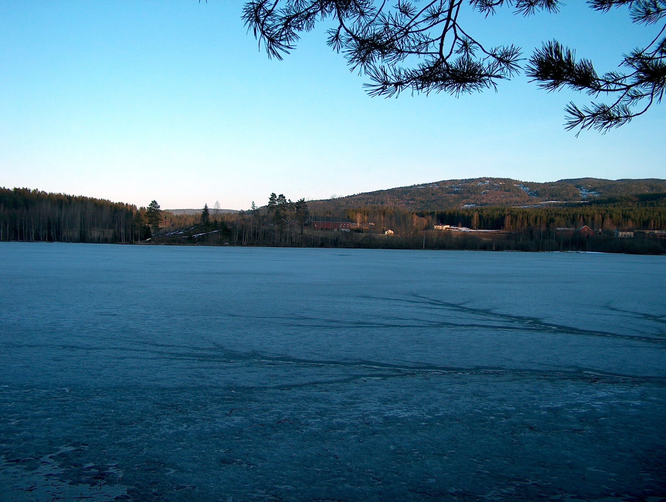 Utsyn over Torevannet